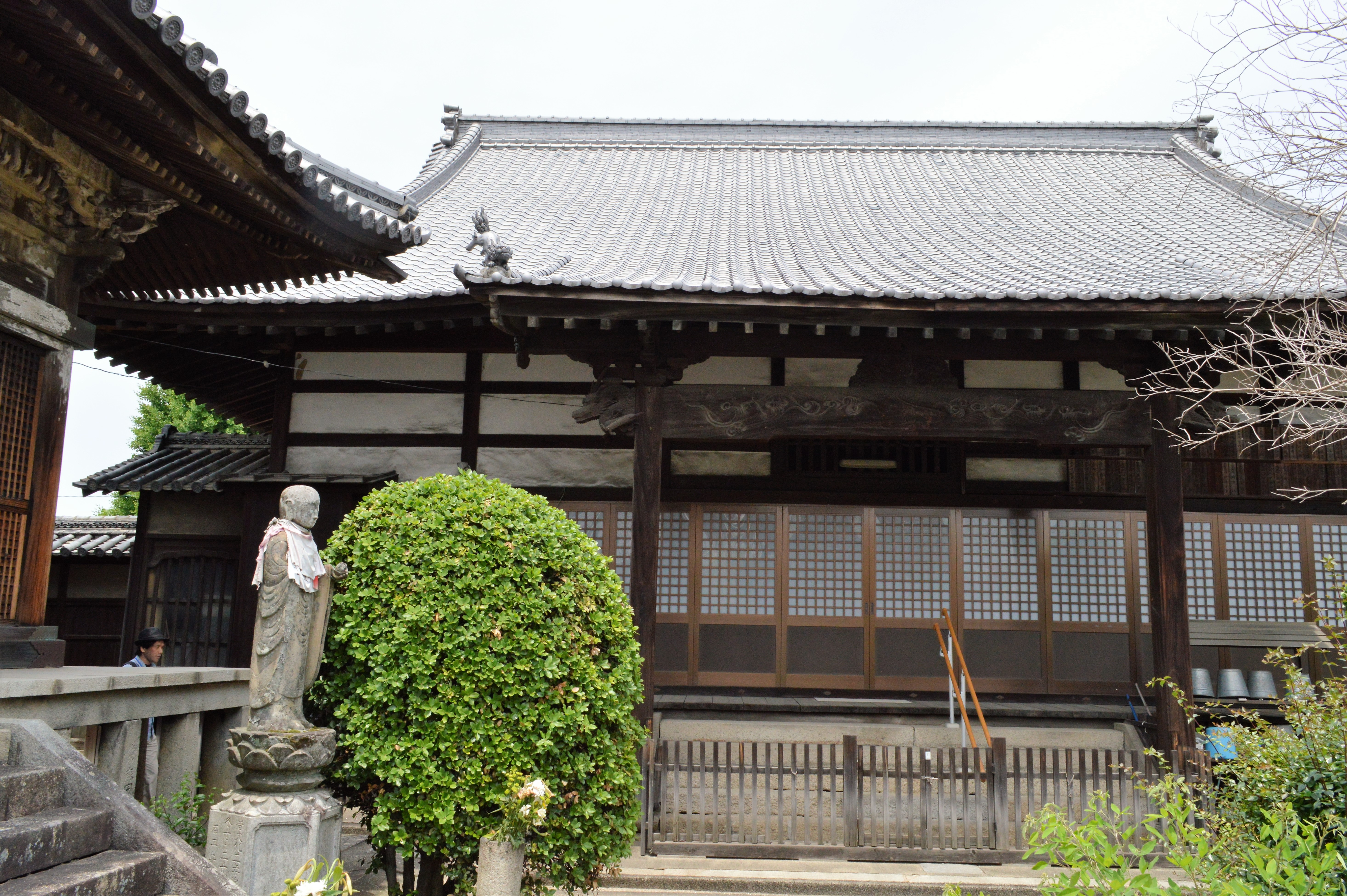 香川県丸亀市にある浄土宗の寿覚院。